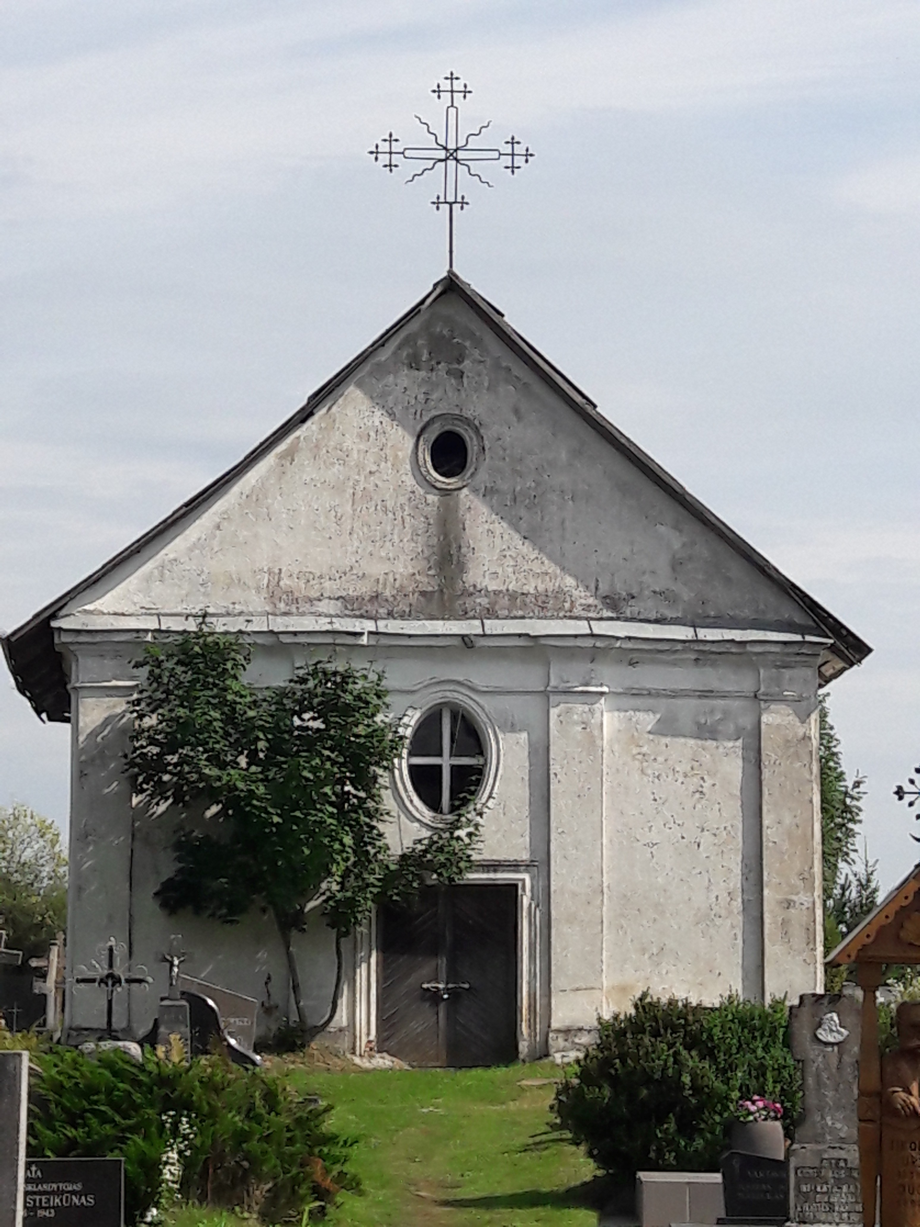 Jiezno kapinių koplyčia